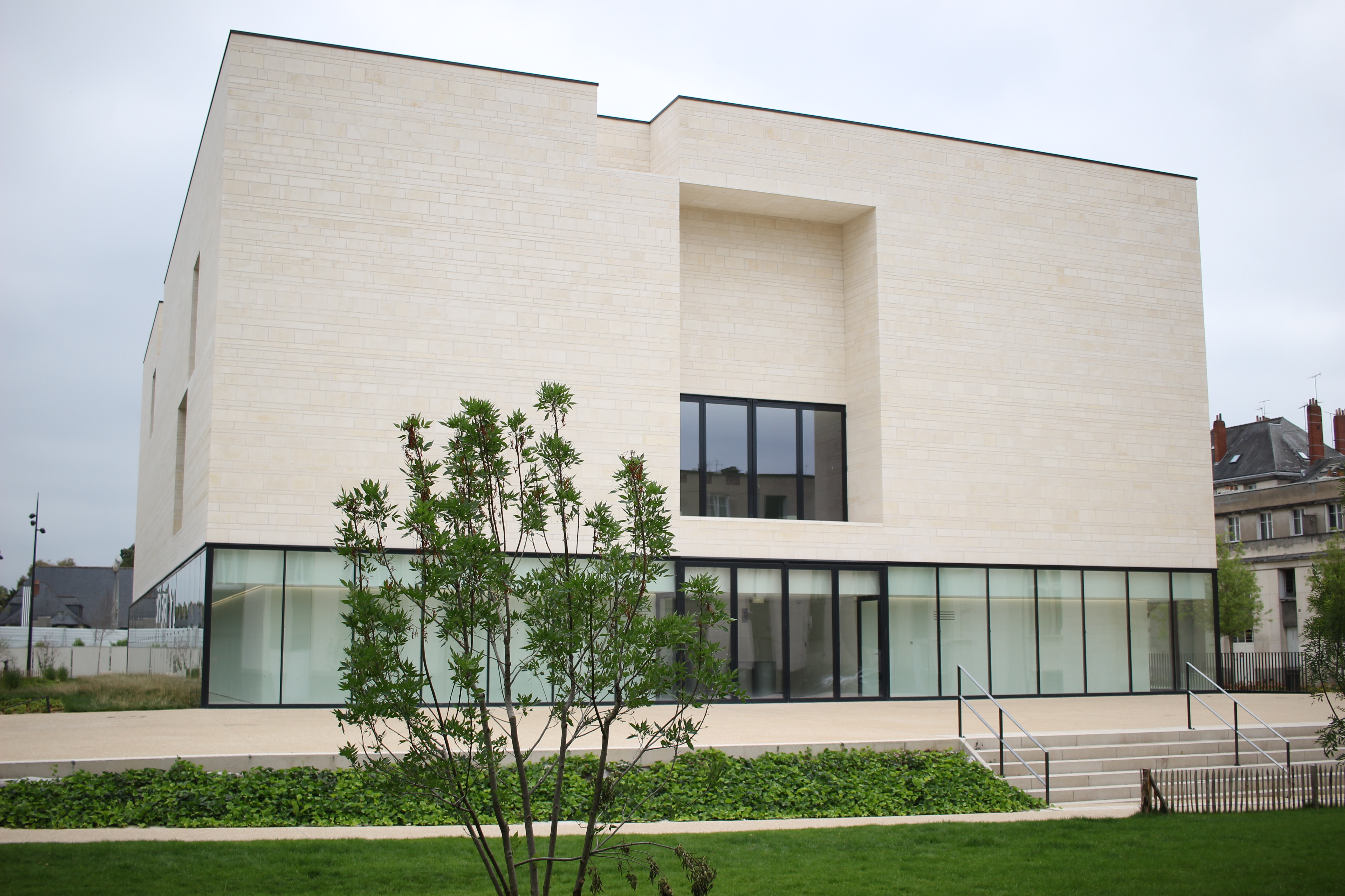 L'arrière du nouveau centre de création contemporaine Olivier Debré à Tours, en 2017.